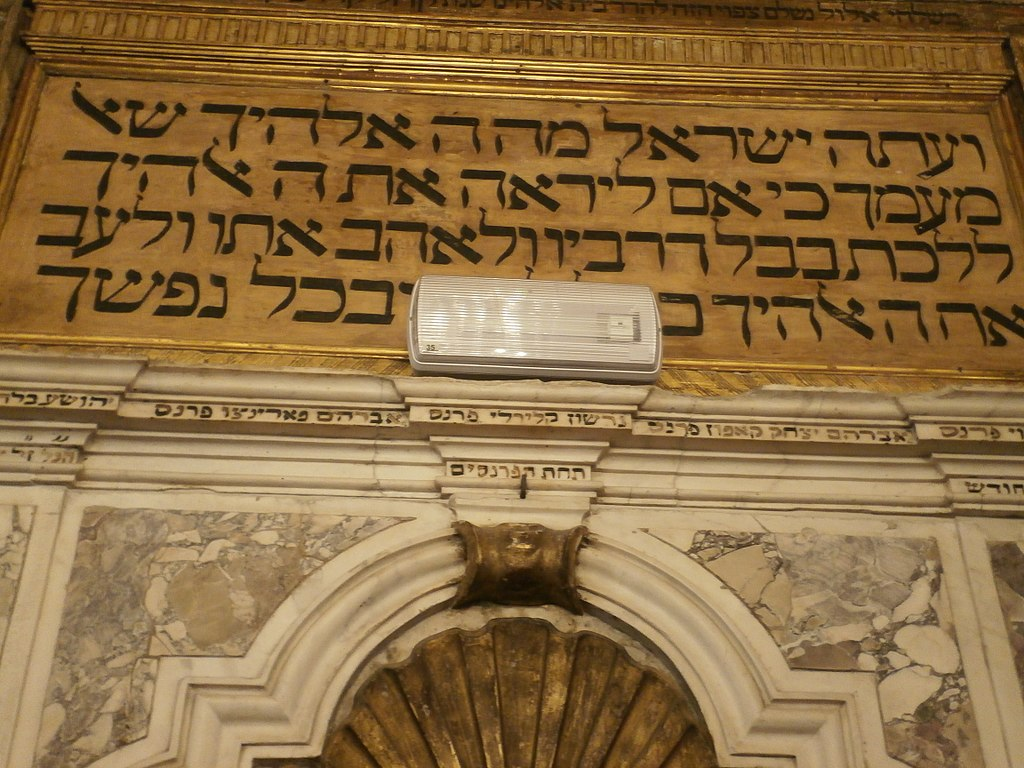 בית כנסת קנטון